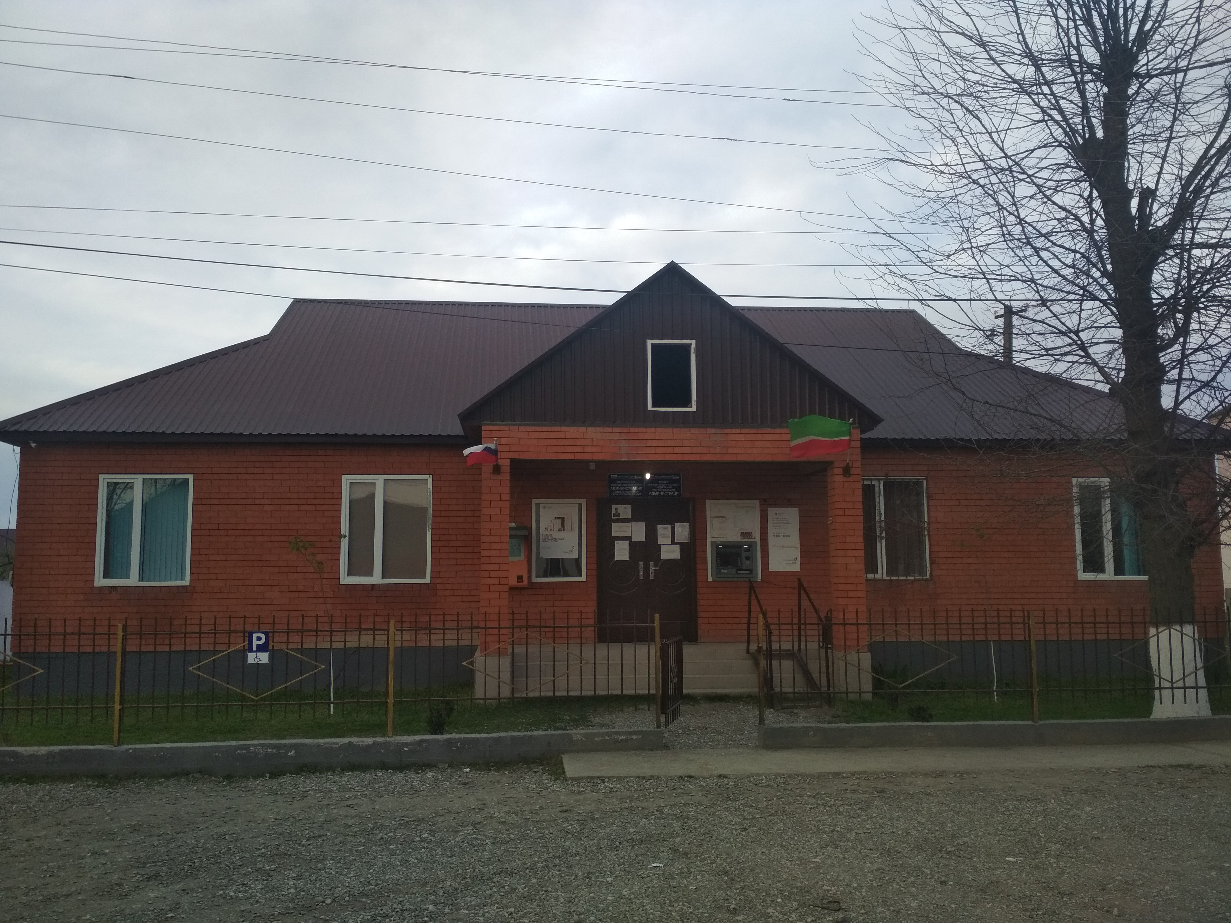 Нохчийн: Лаха Неврен Администраци